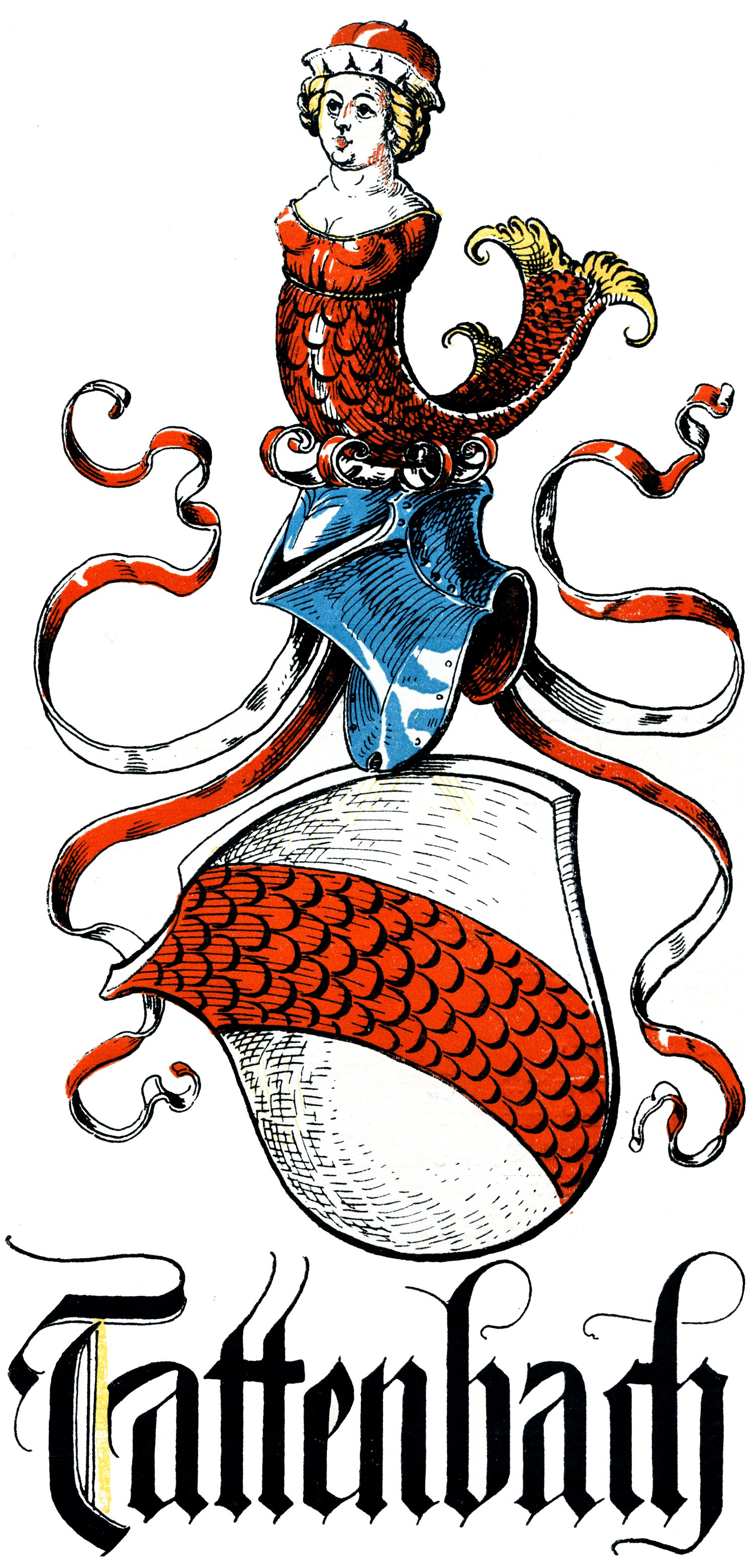 Wappen derer von Tattenbach